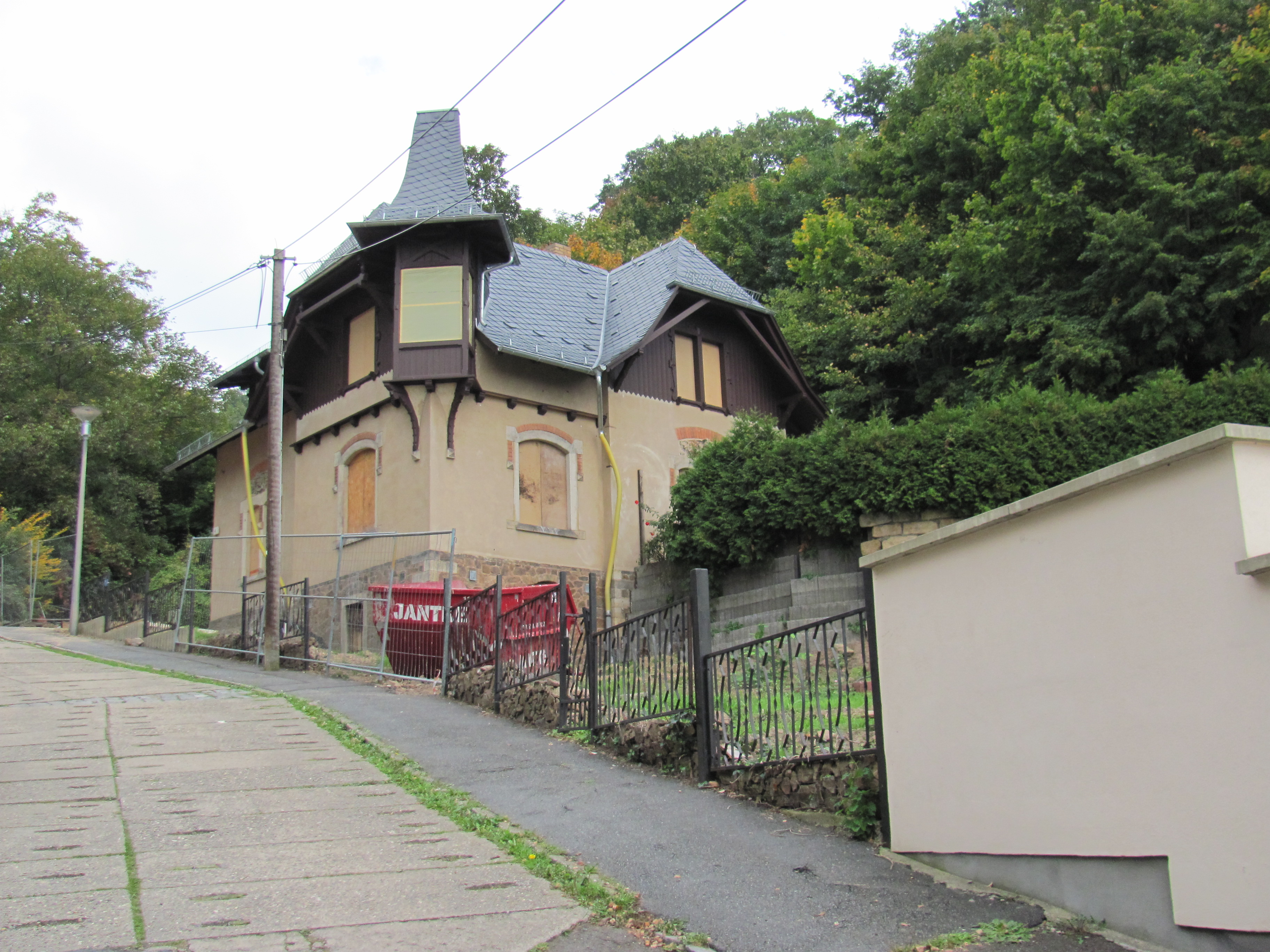 Burgstraße 4